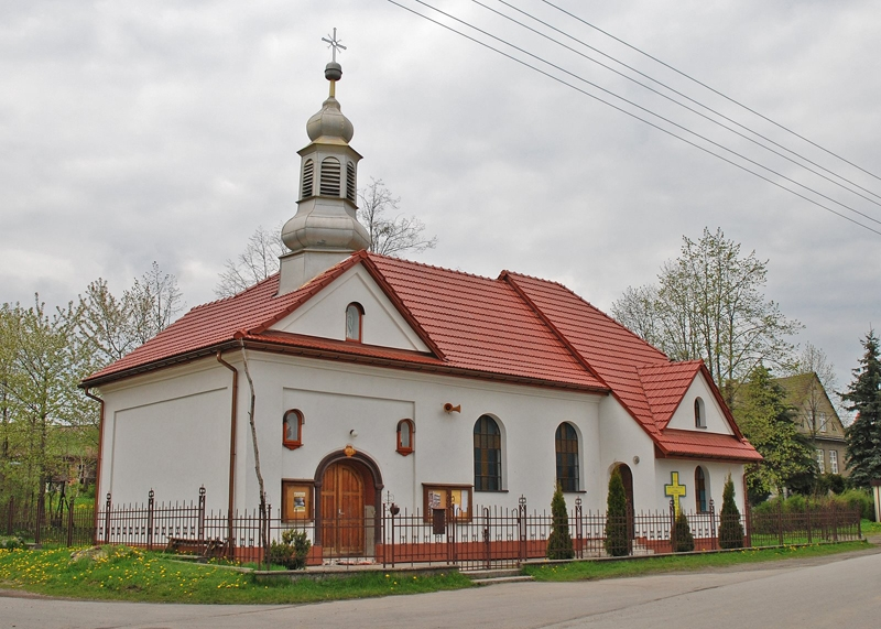 Koziniec - kaplica MB Różańcowej